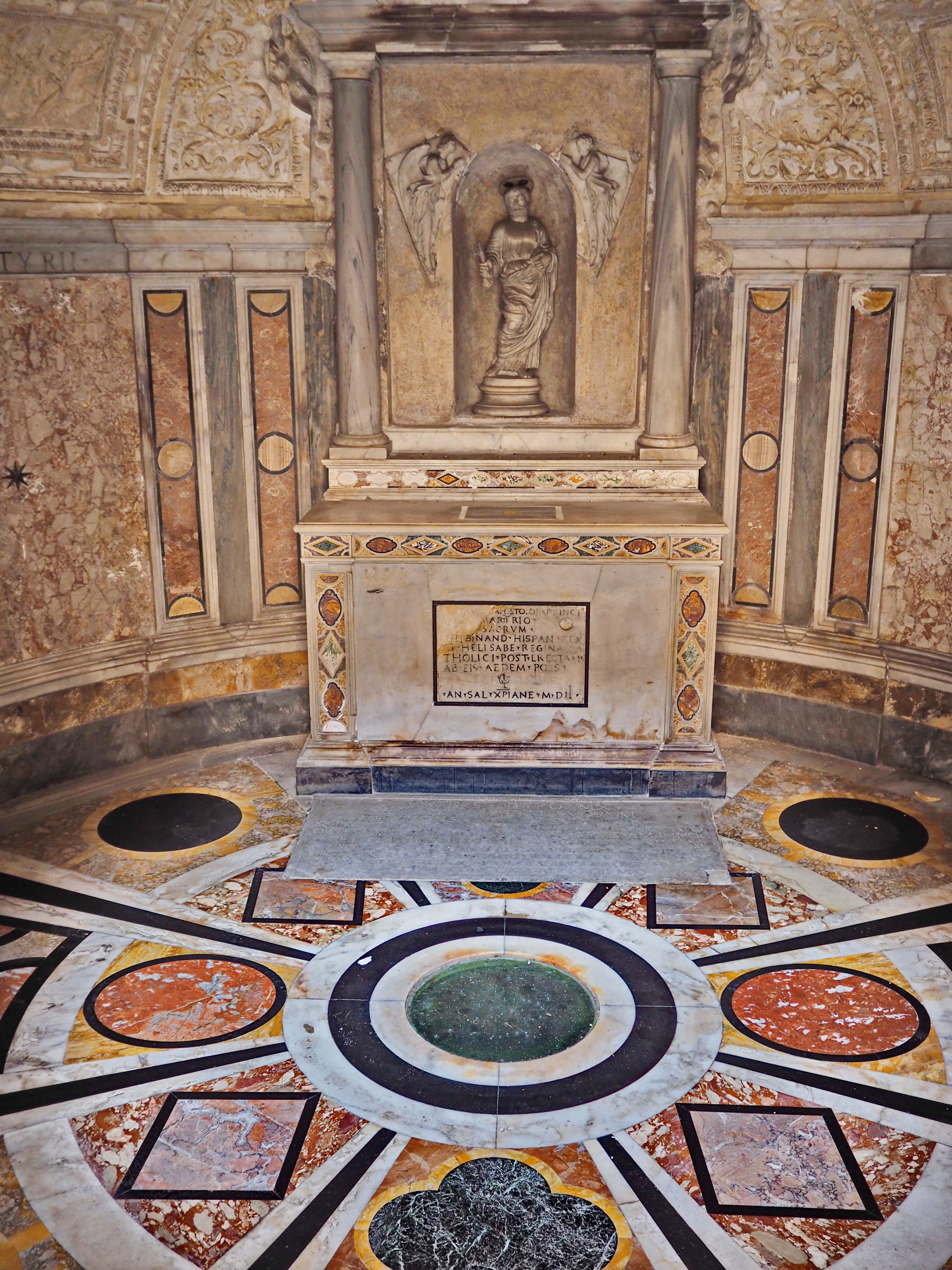 Tempietto del Bramante (Rom); Krypta